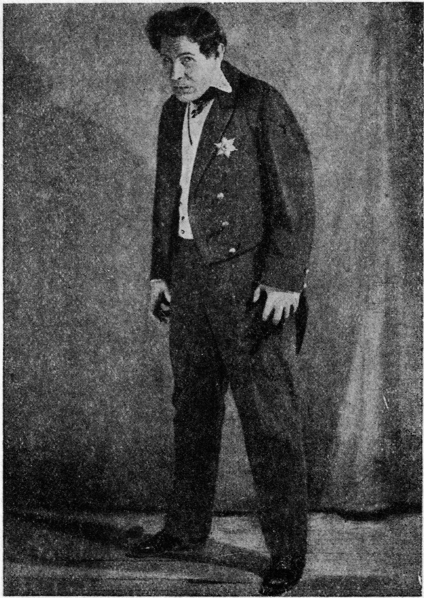 Актёр Александр Щагин в роли Вышневского (спектакль "Доходное место" Театра Революции, 1932)